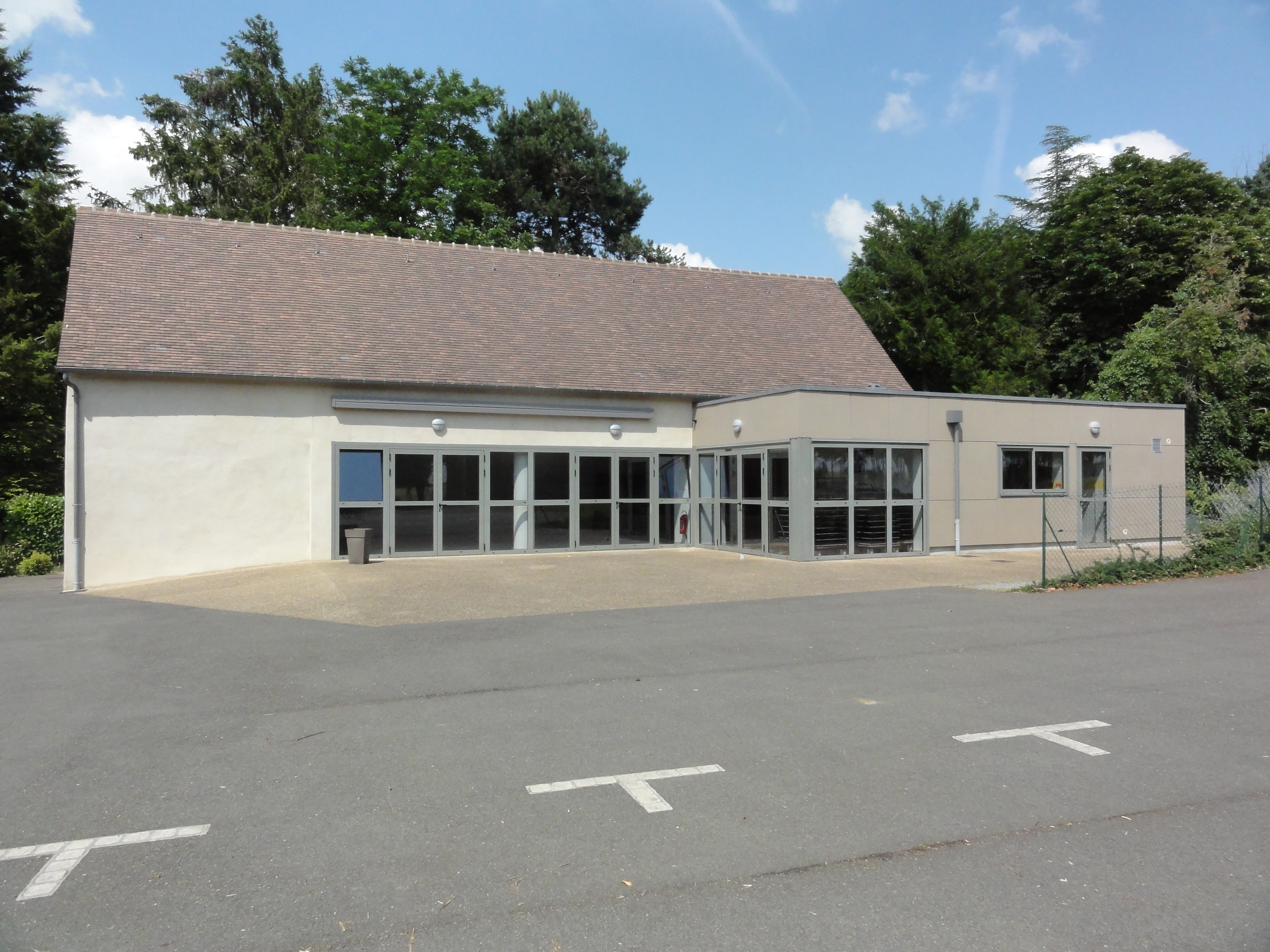 Saint-Germain-sur-Sarthe, salle des fêtes